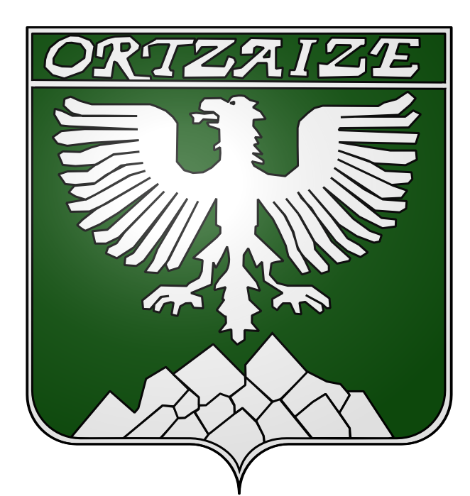 Blason Ortzaize